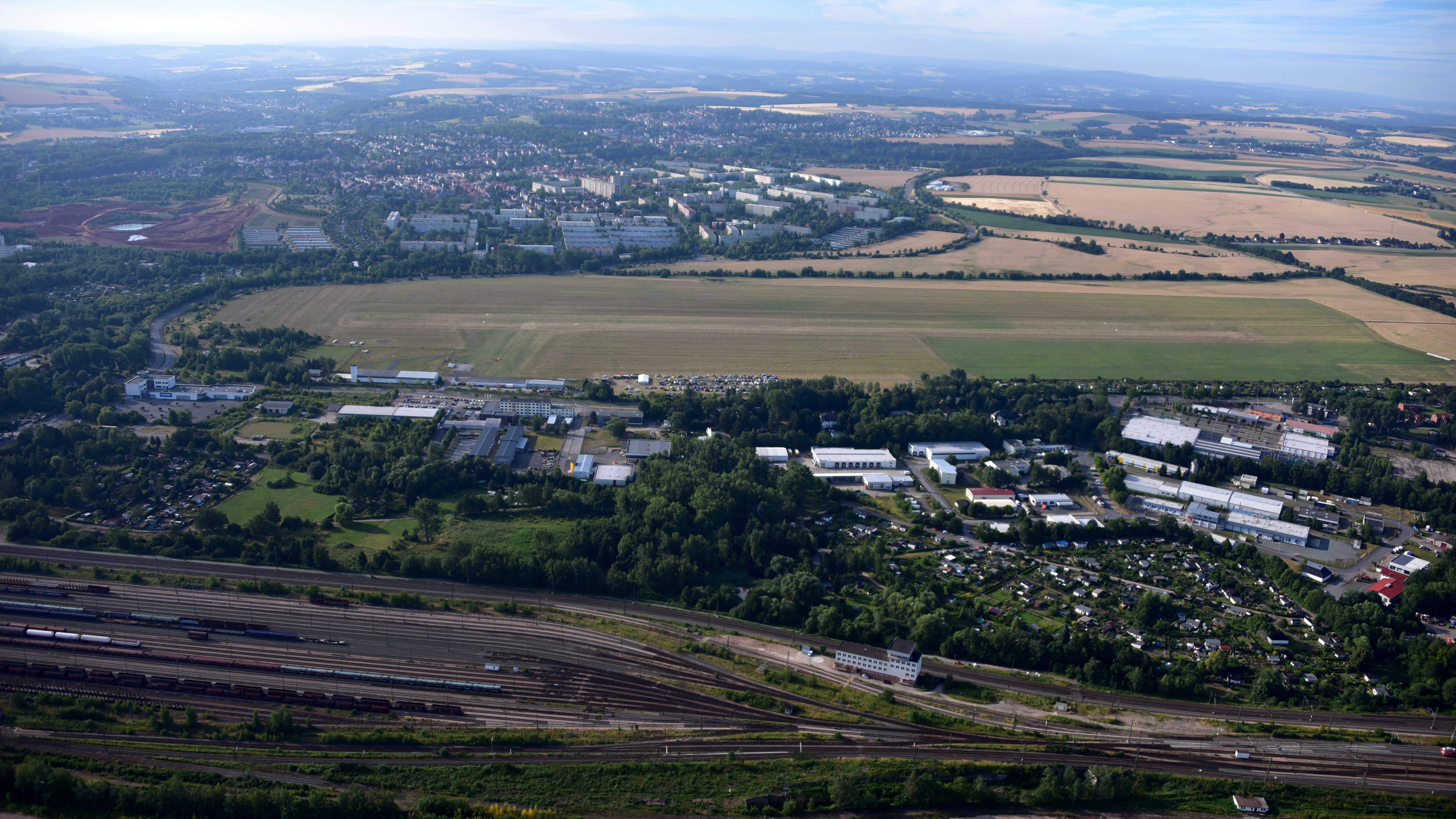 Flugplatz Zwickau, Luftaufnahme (2018)